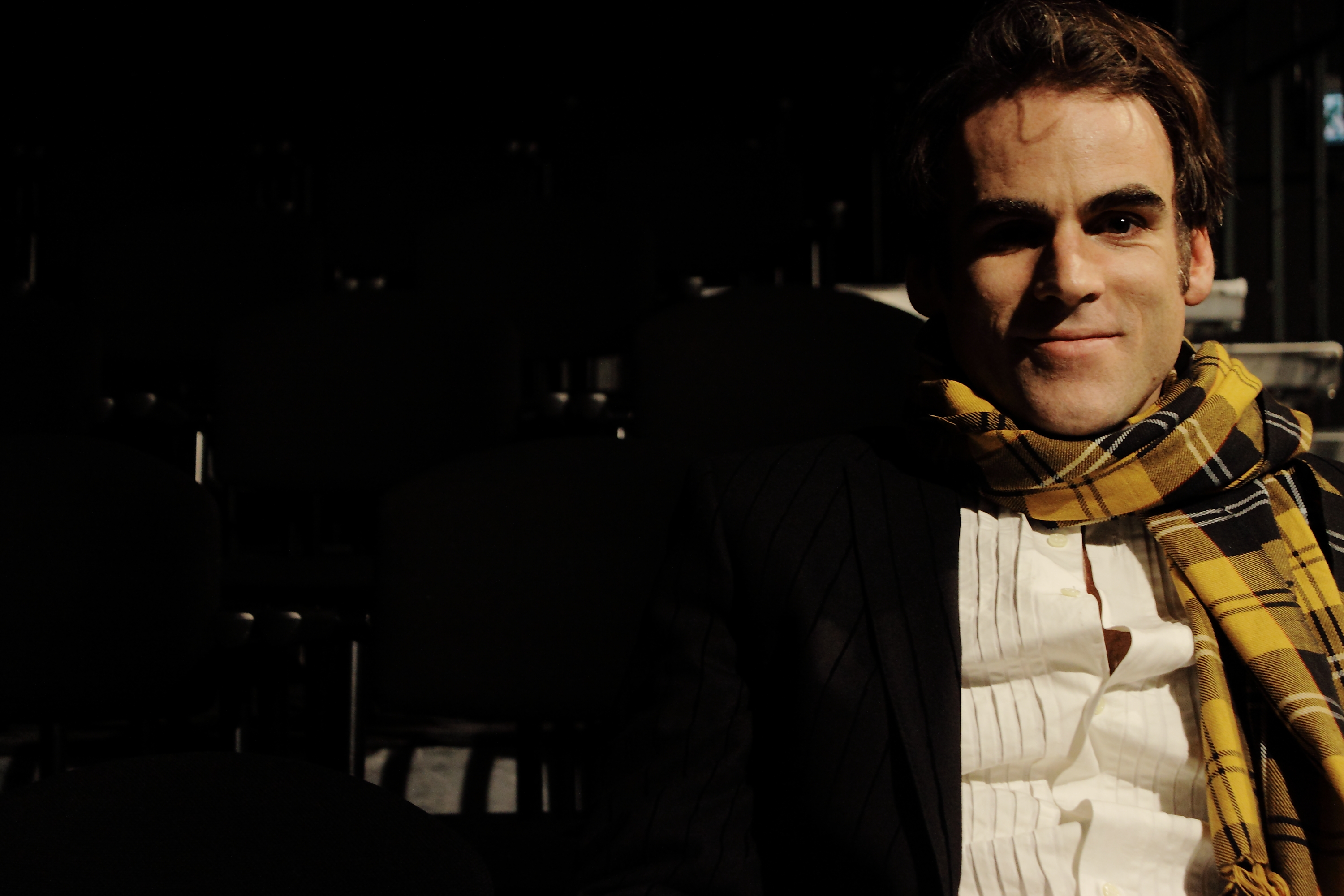 Sebastian_Blomberg, kurz nach der Vorstellung von "Das Interview" am Zürcher Theater Neumarkt